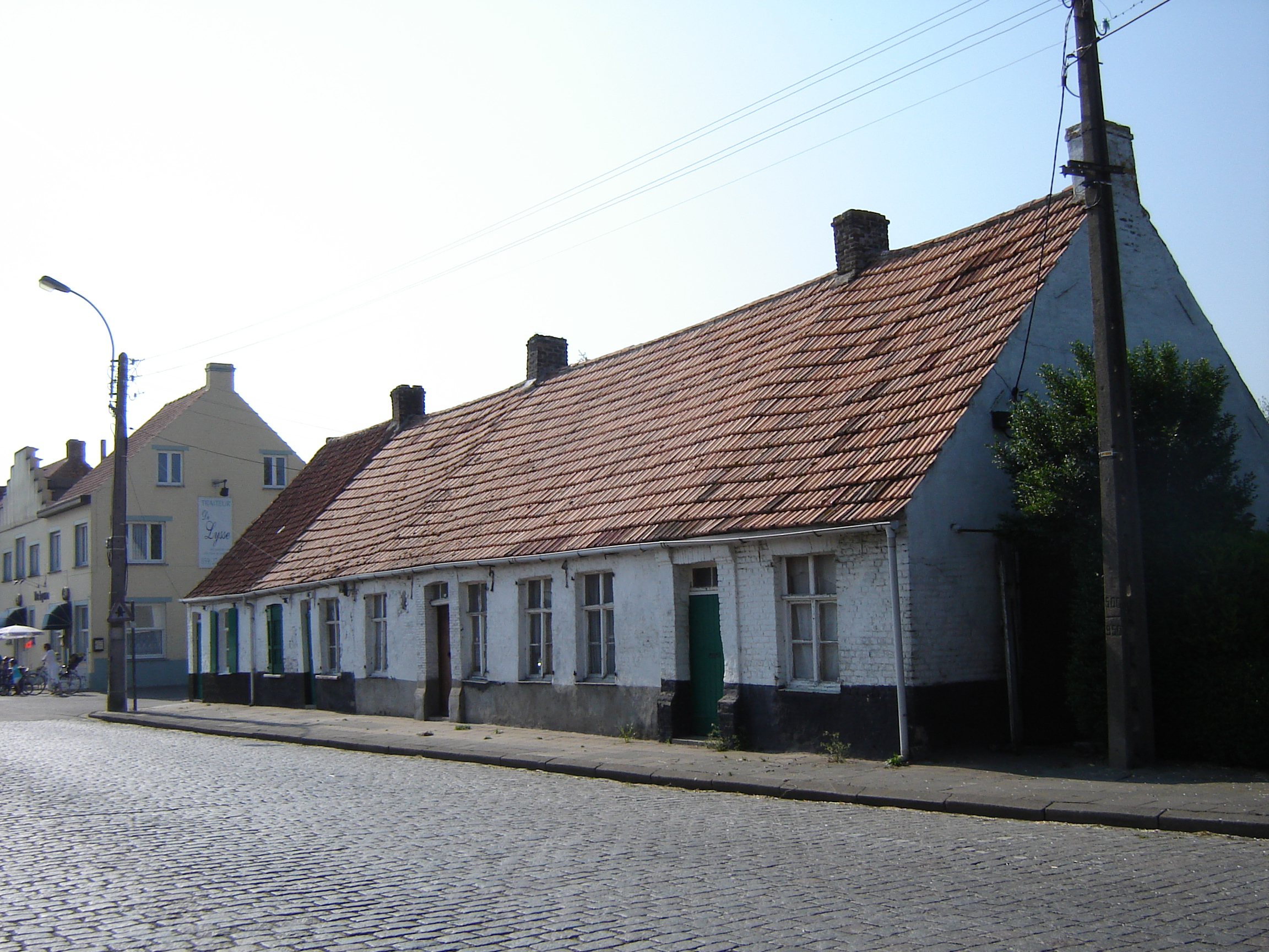 Huisjes aan de Provincieweg in dorpscentrum van Moere Houses on the Provincieweg street in the village centre of Moere, Gistel, West Flanders, Belgium